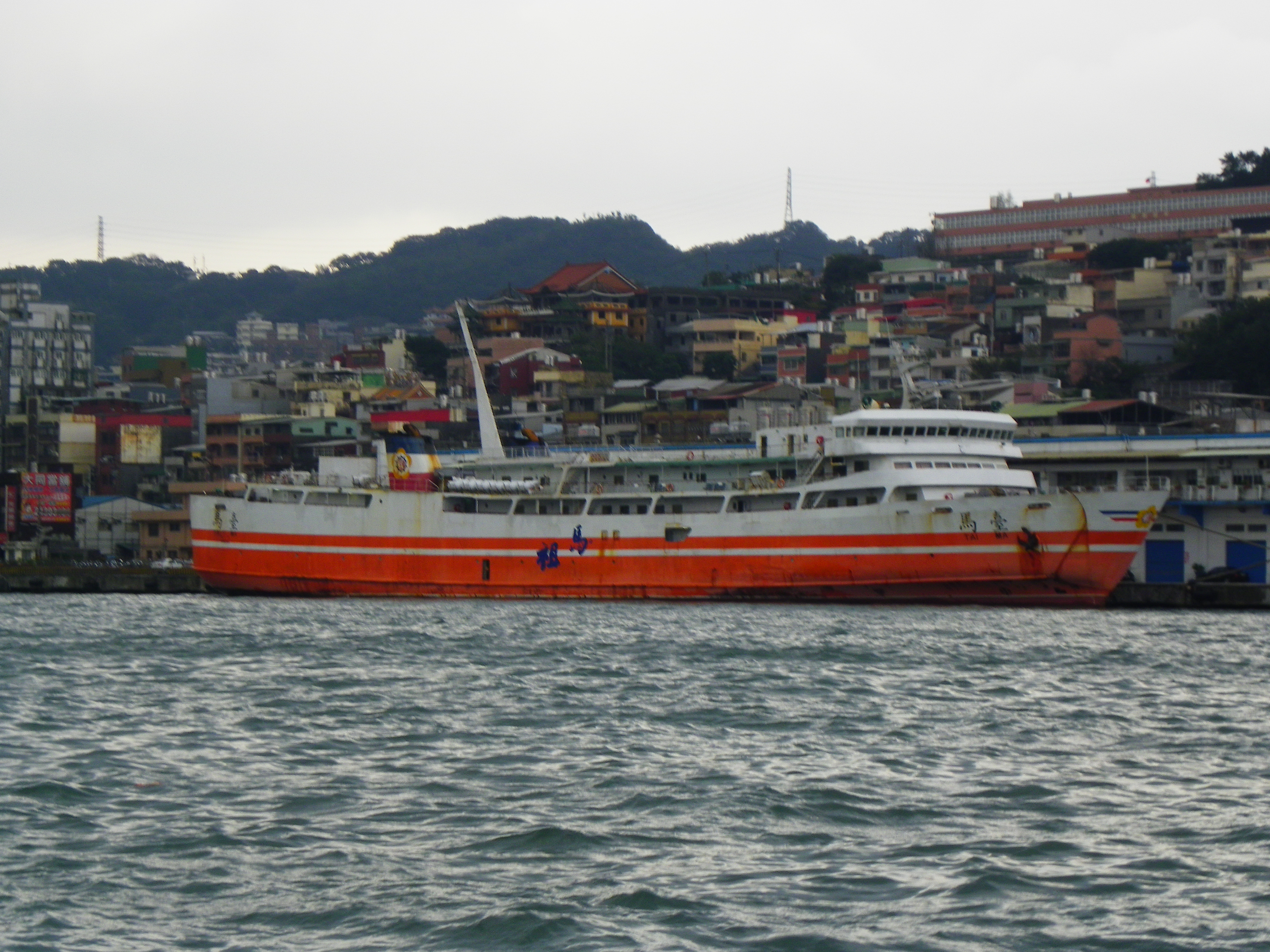 停泊於基隆港西岸旅客中心前的臺馬輪，攝於航行中的熱海壹號遊艇。